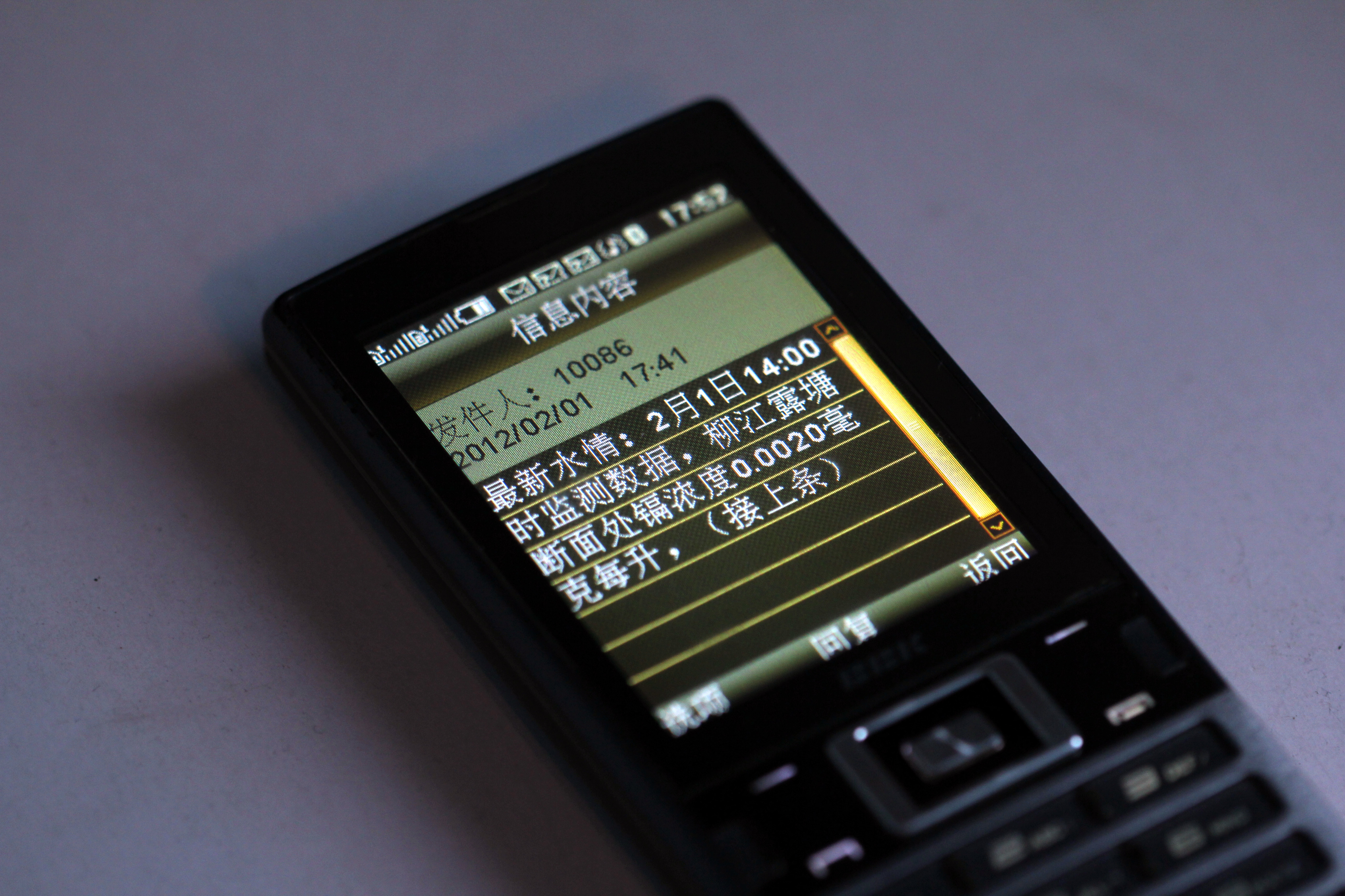 龙江镉污染情况短信